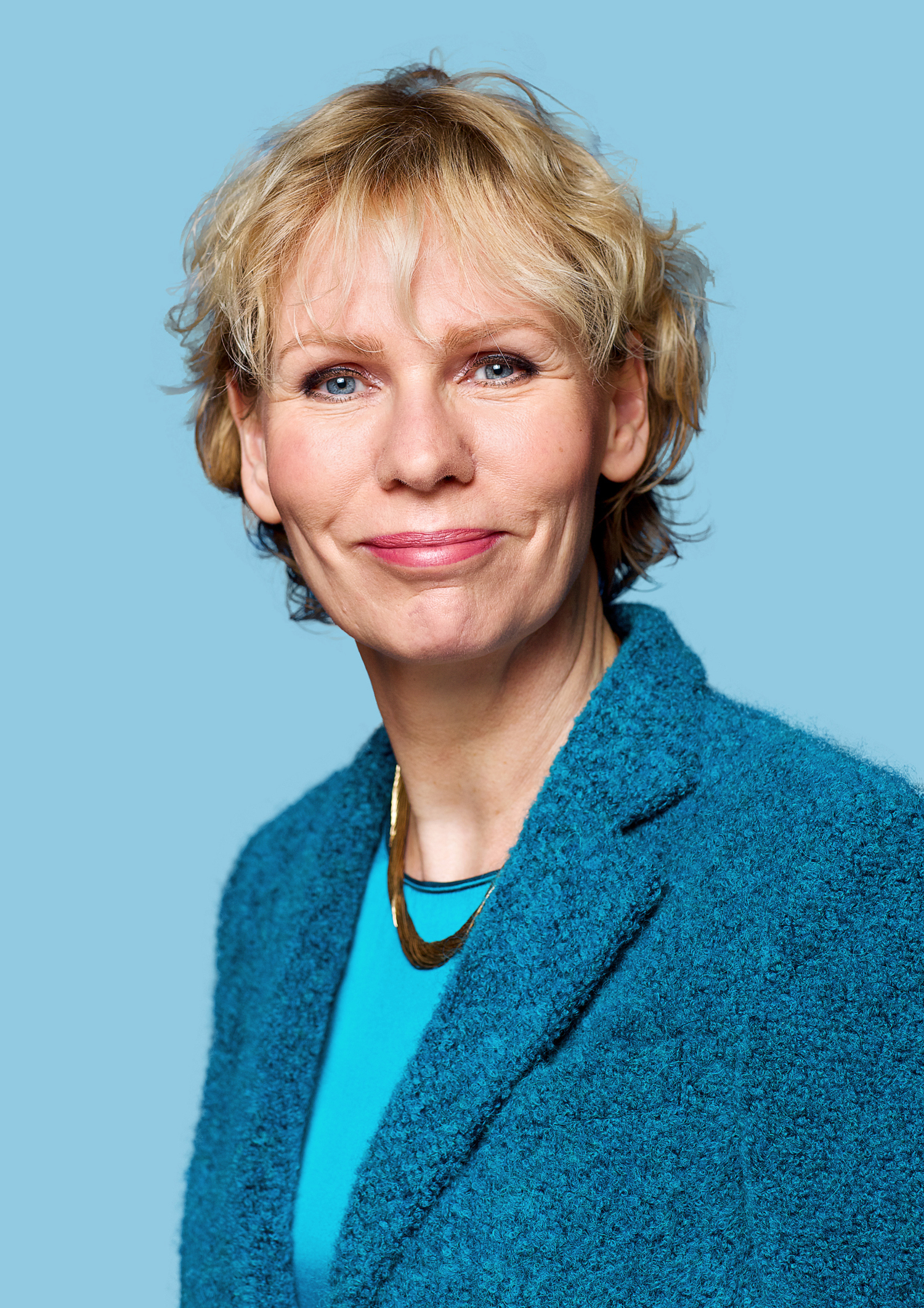 18 januari 2015. Lijsttrekker voor de Eerste Kamerverkiezingen. Op pvda.nl de volledige kandidatenlijst: bit.ly/1zpNRIG. Foto Lex Draijer.